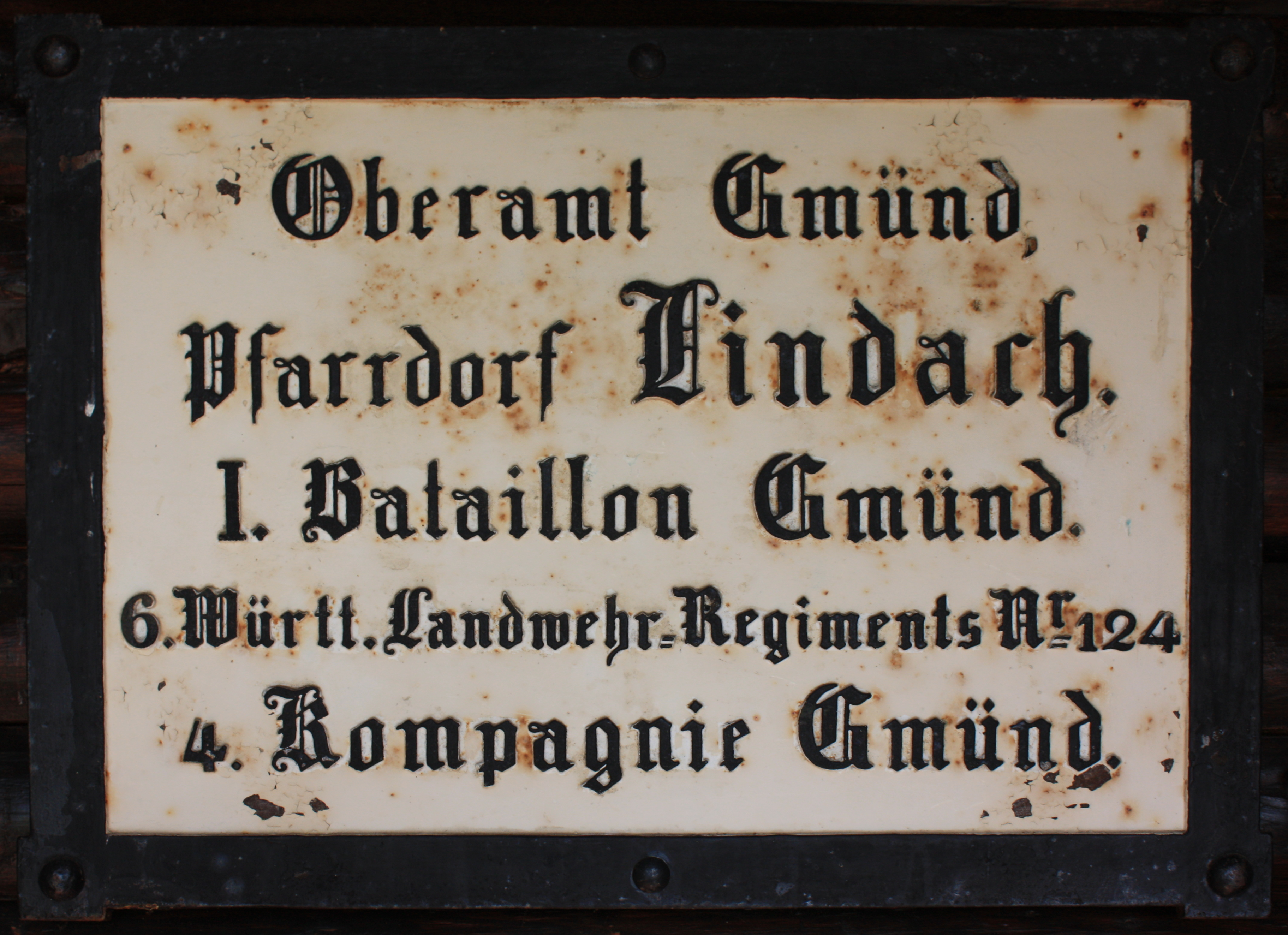 Historische Ortstafel in Lindach (Schwäbisch Gmünd) im Originalzustand (weißer Untergrund mit schwarzer Schrift); angebracht an der Wanderhütte des Ortsgruppe Lindach des Schwäbischen Albvereins